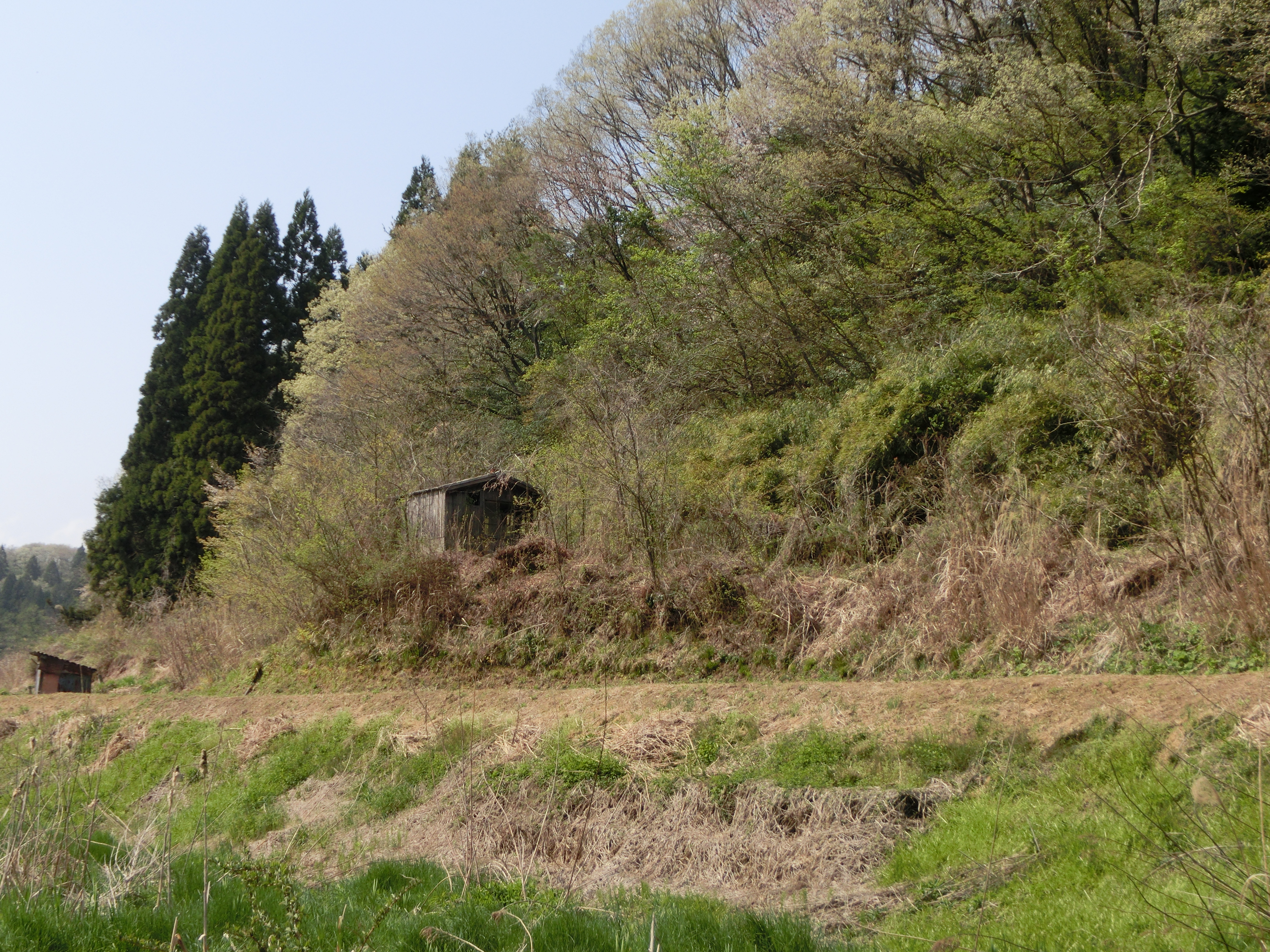 鹿波駅を下の道路より撮影